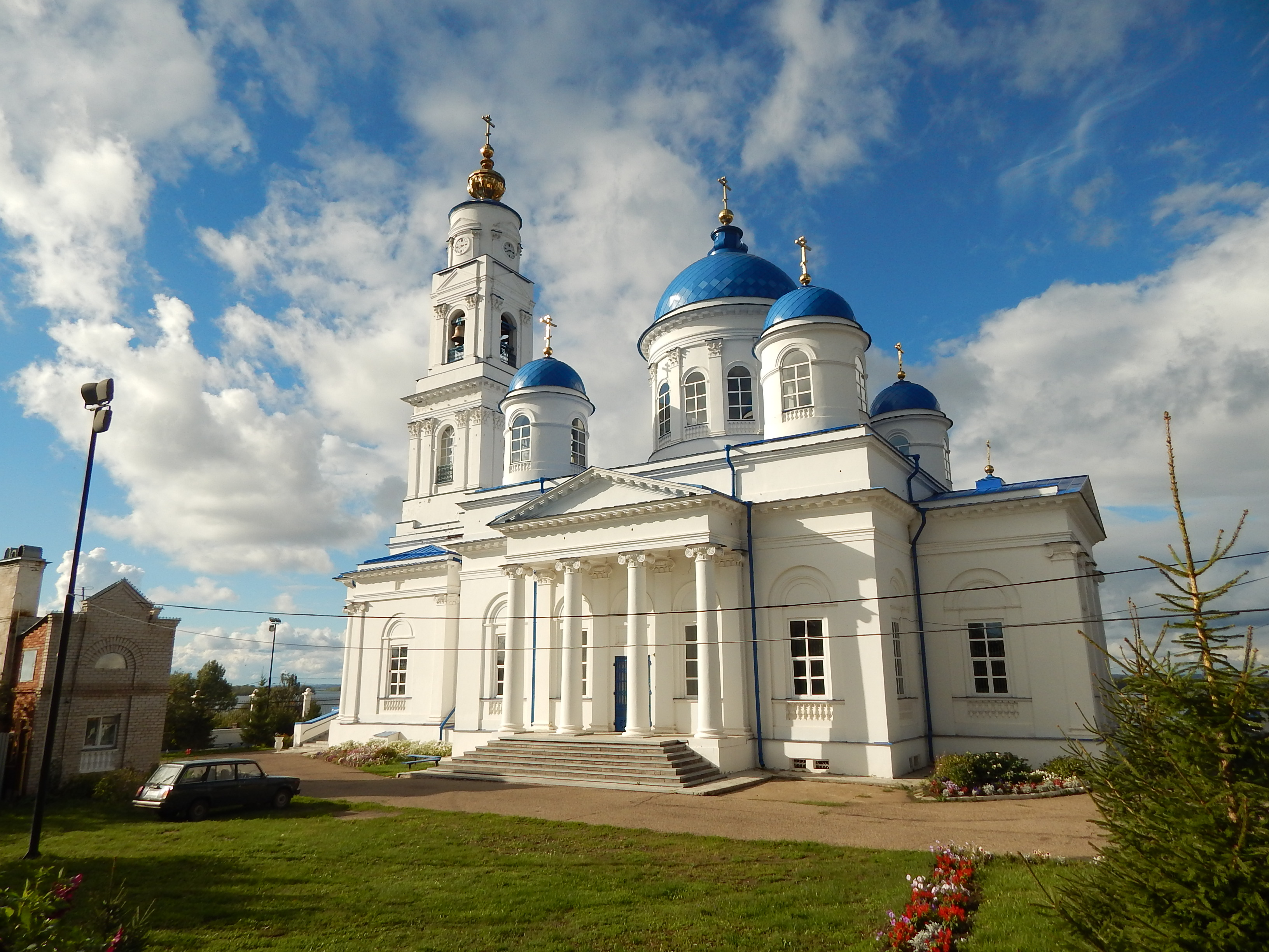 Никольский собор: улица Карла Маркса, 2, Чистополь, Татарстан